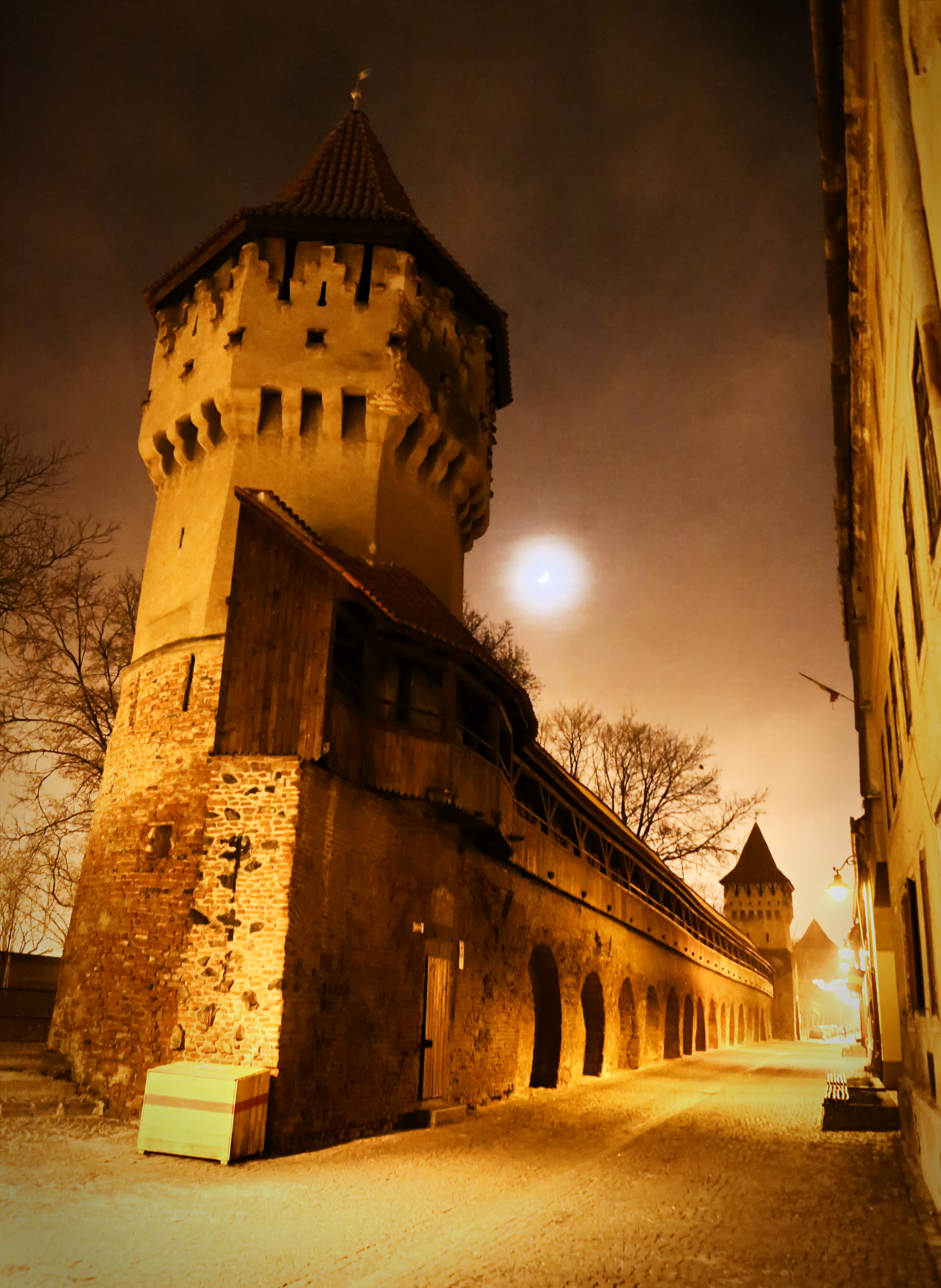 Incinta III: Turnuri de apărare, Turnul Dulgherilor, Turnul Olarilor, Turnul Archebuzierilor, Turn de Poartă, curtine 03